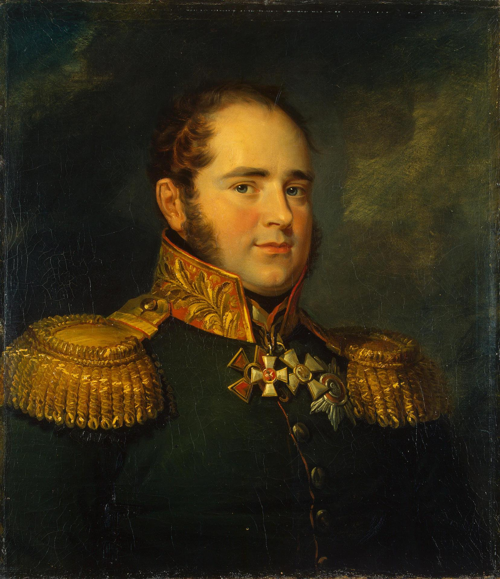 Baggovut Karl